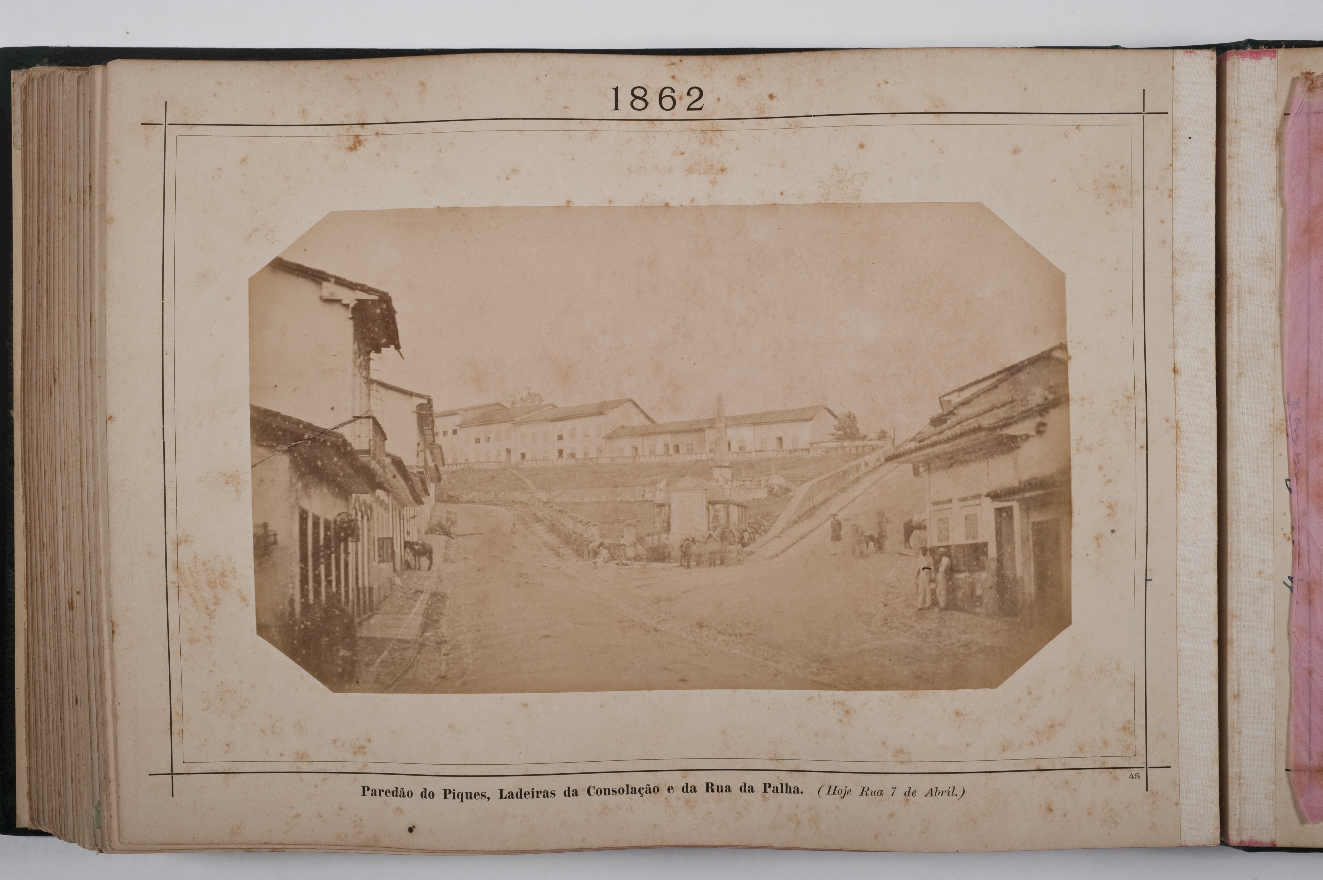 Página 48 do Álbum Comparativo da Cidade de São Paulo. Obra que integra o acervo do Museu Paulista da USP.